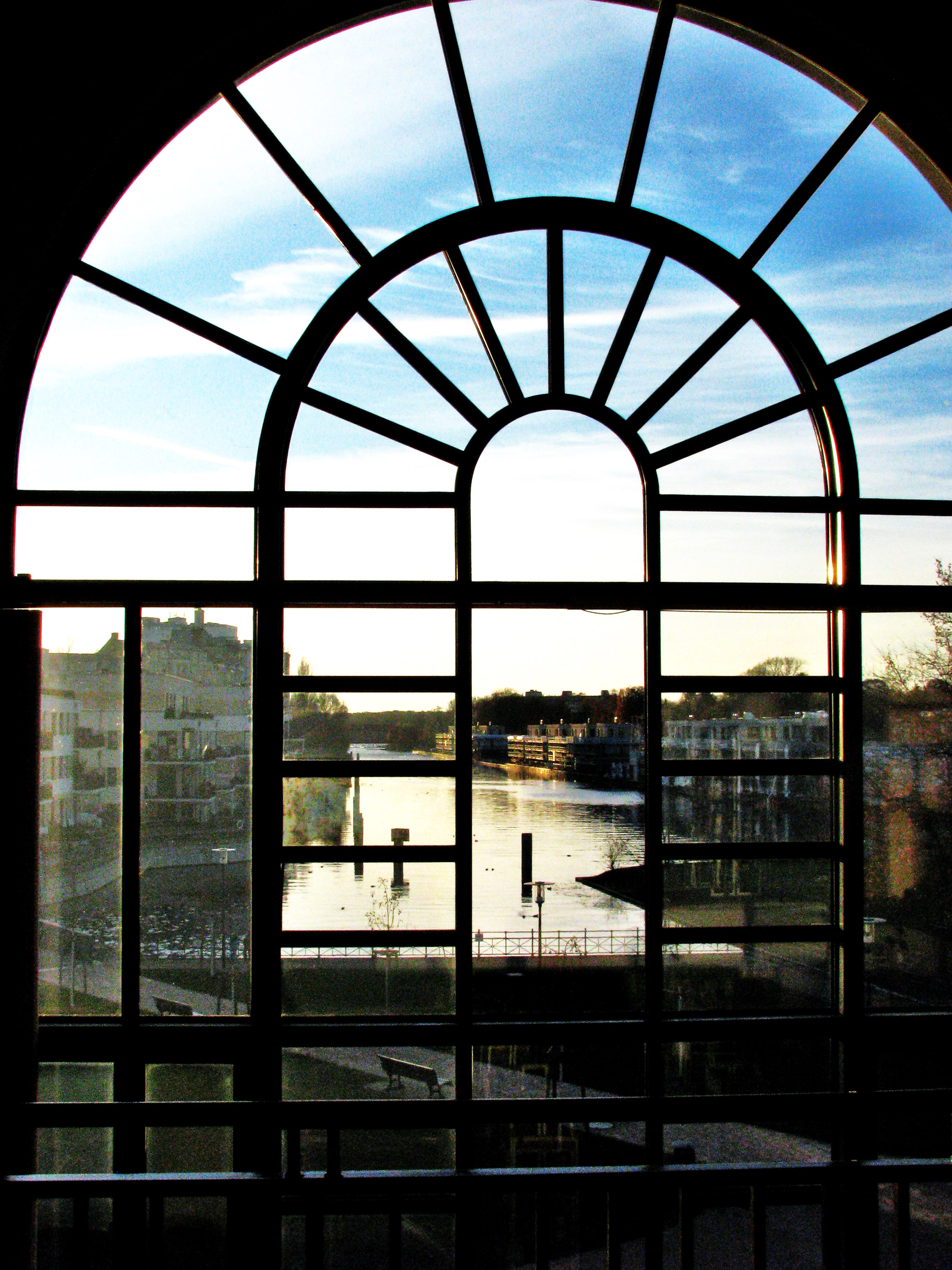 Humboldt-Bibliothek Ausblick nach Westen